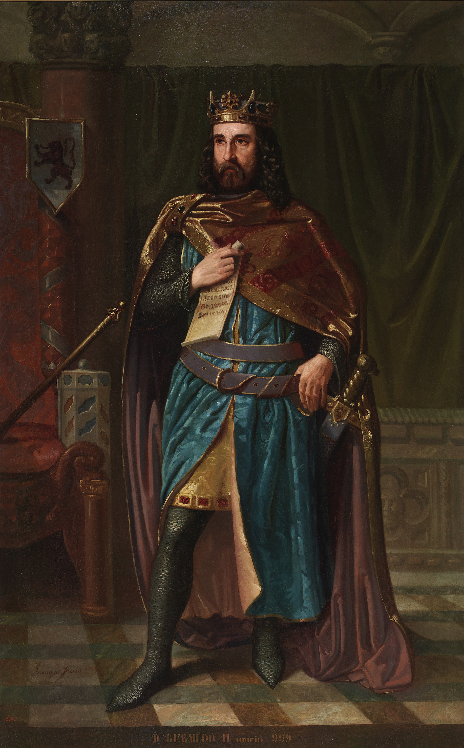 Retrato imaginario del rey Bermudo II de León (¿?-999), que fue hijo del rey Ordoño III de León. Falleció en el año 999 y fue sucedido por su hijo, Alfonso V de León.